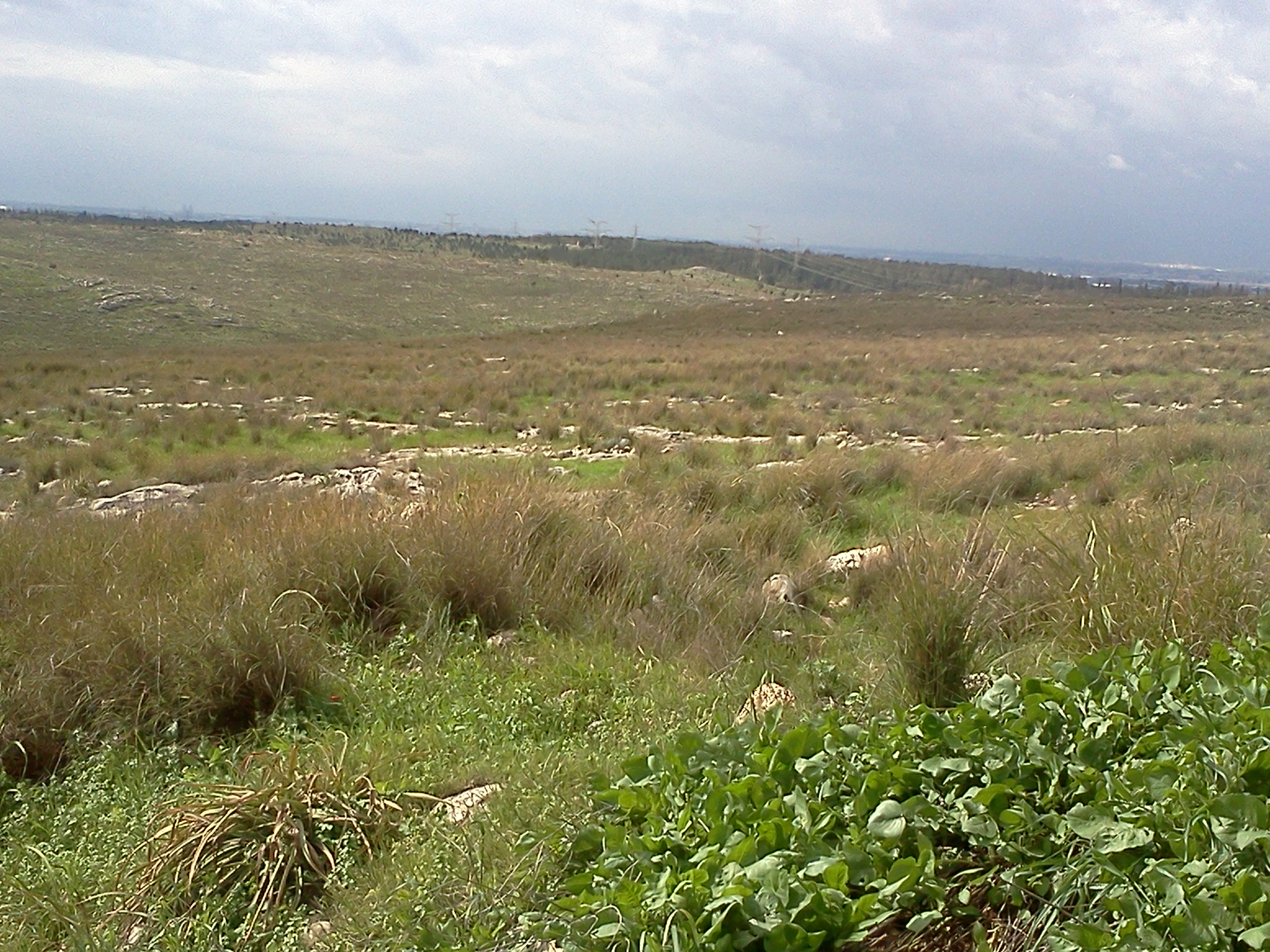 שטח בתה בחורף